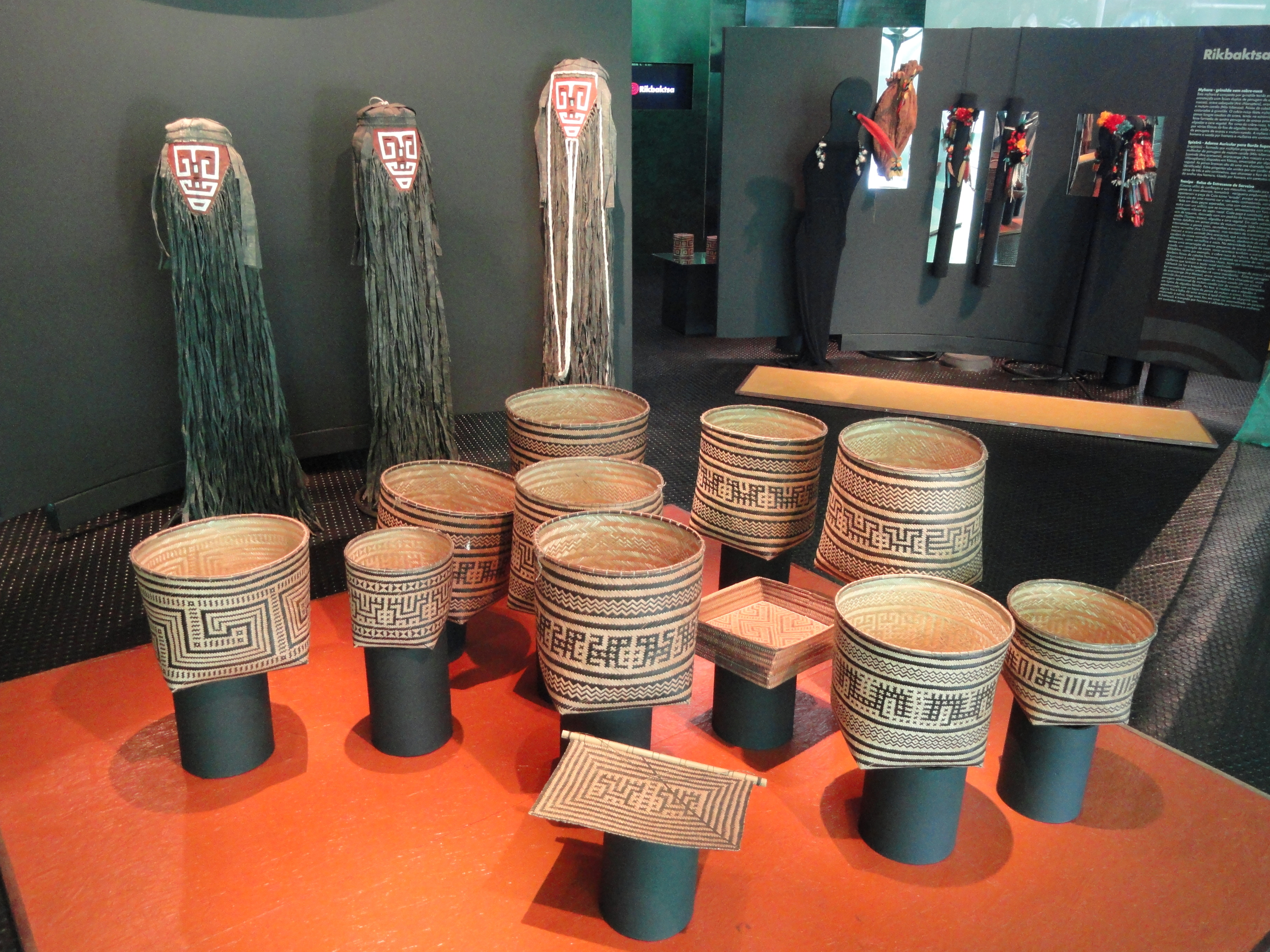 Exhibit in the Memorial dos Povos Indígenas, Brasília, Brazil.